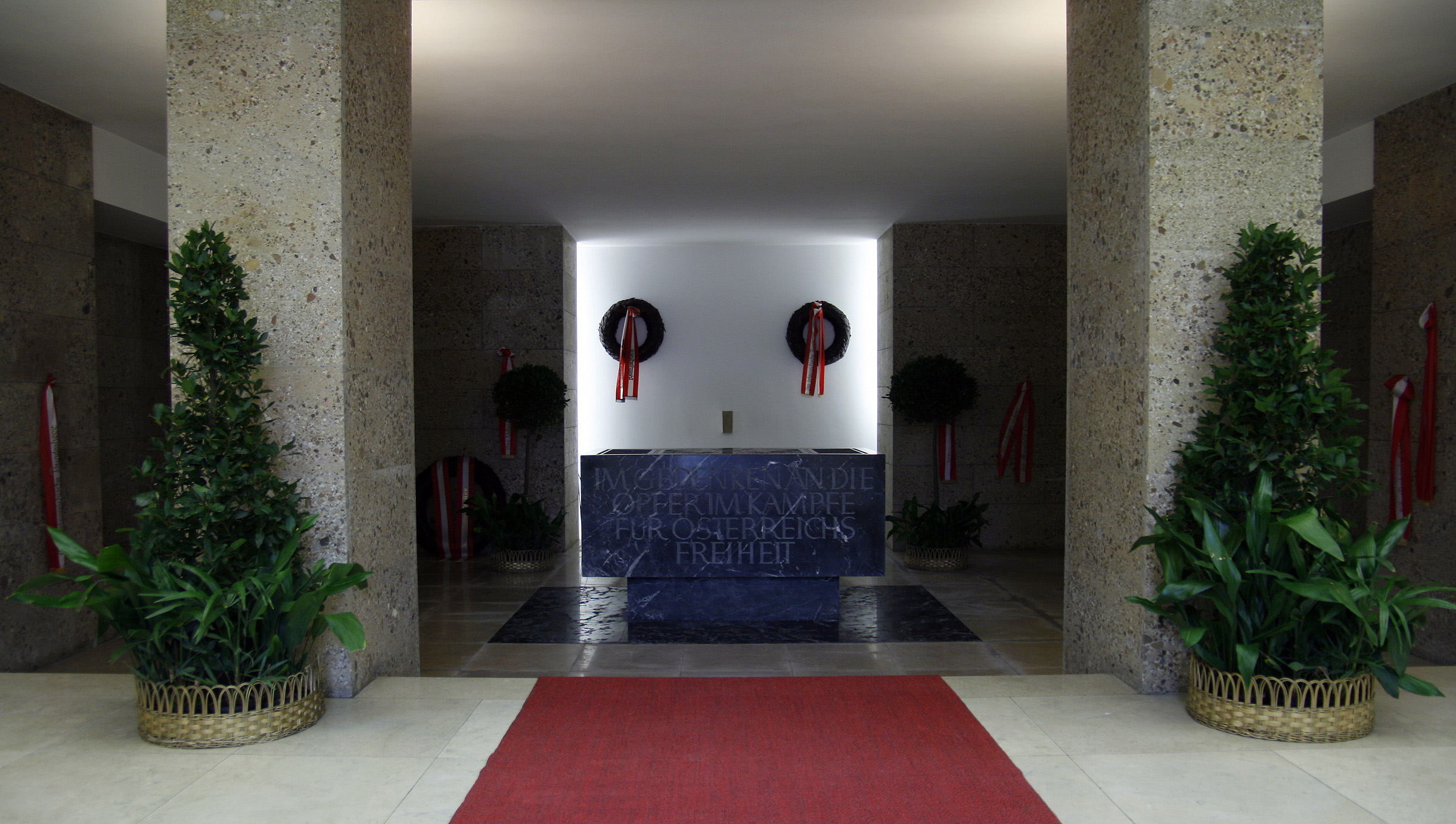 Der Weiheraum im Äußeren Burgtor in Wien.